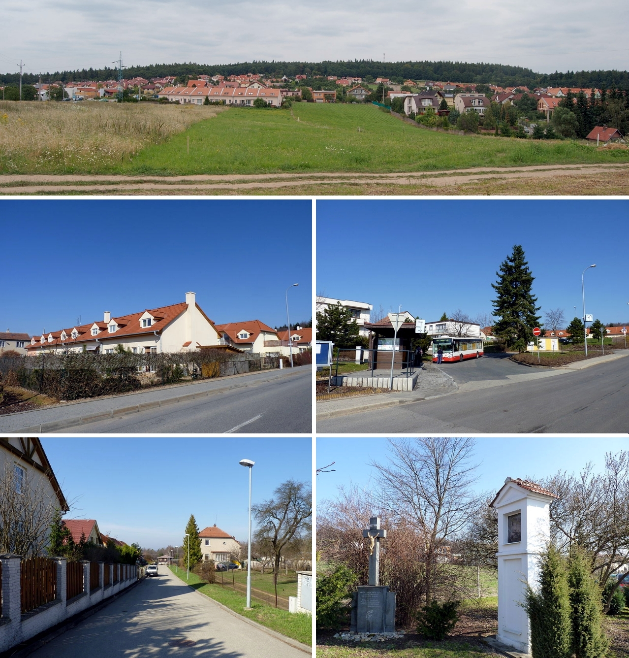 Brněnská městská část Brno-Útěchov vyfotografovaná od jihu